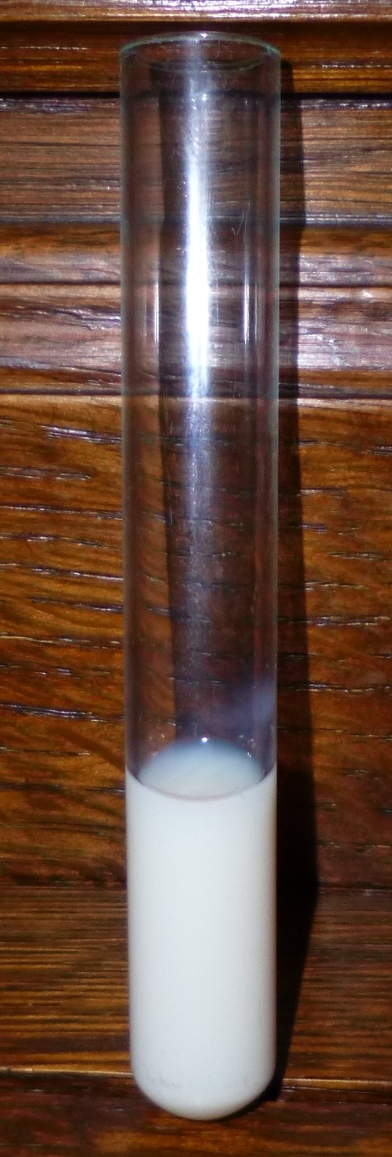 Aspecto lechoso de la linfa procedente del conducto linfático.